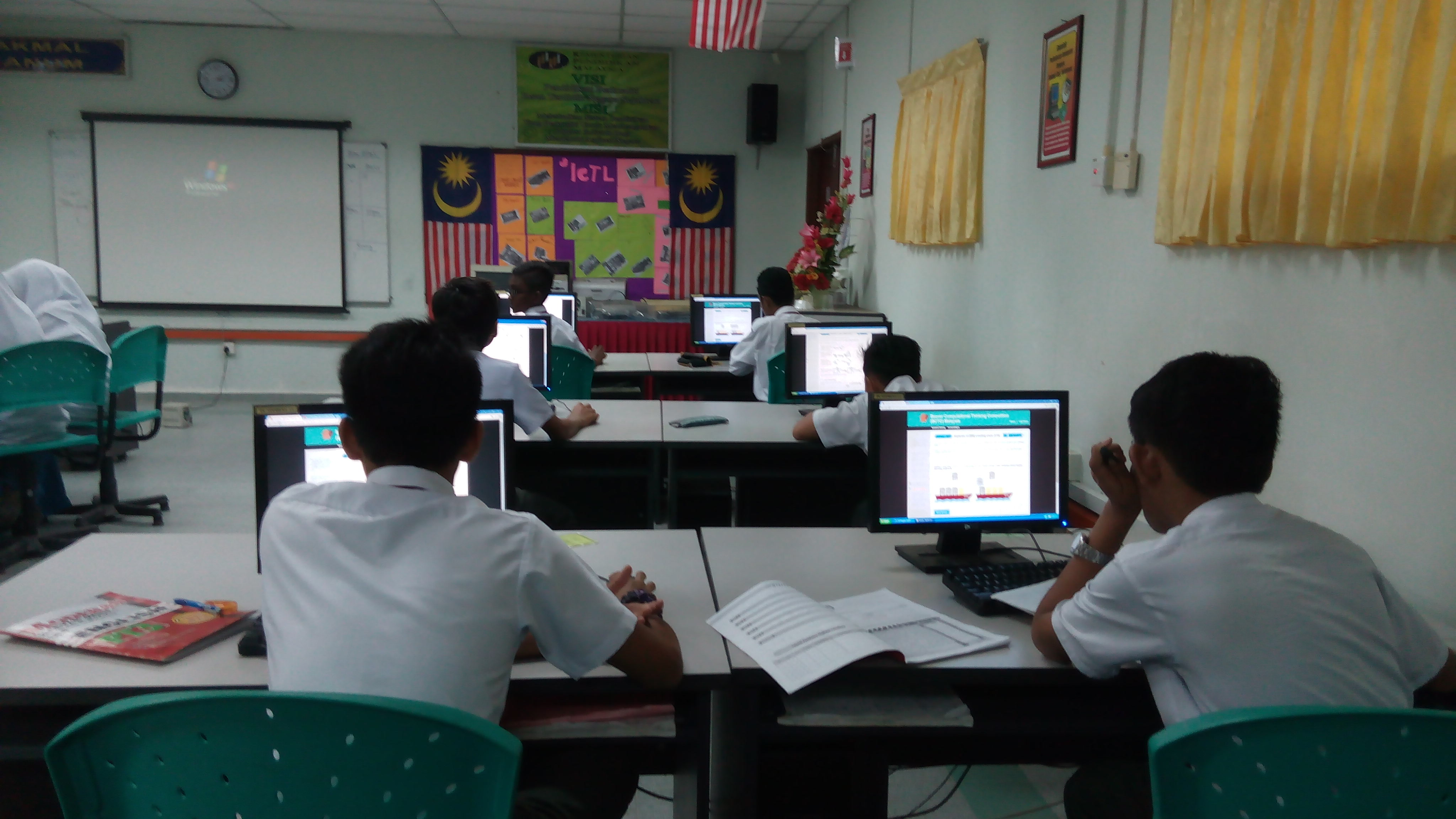 Pelajar sedang menjalani PdPc di Makmal Komputer